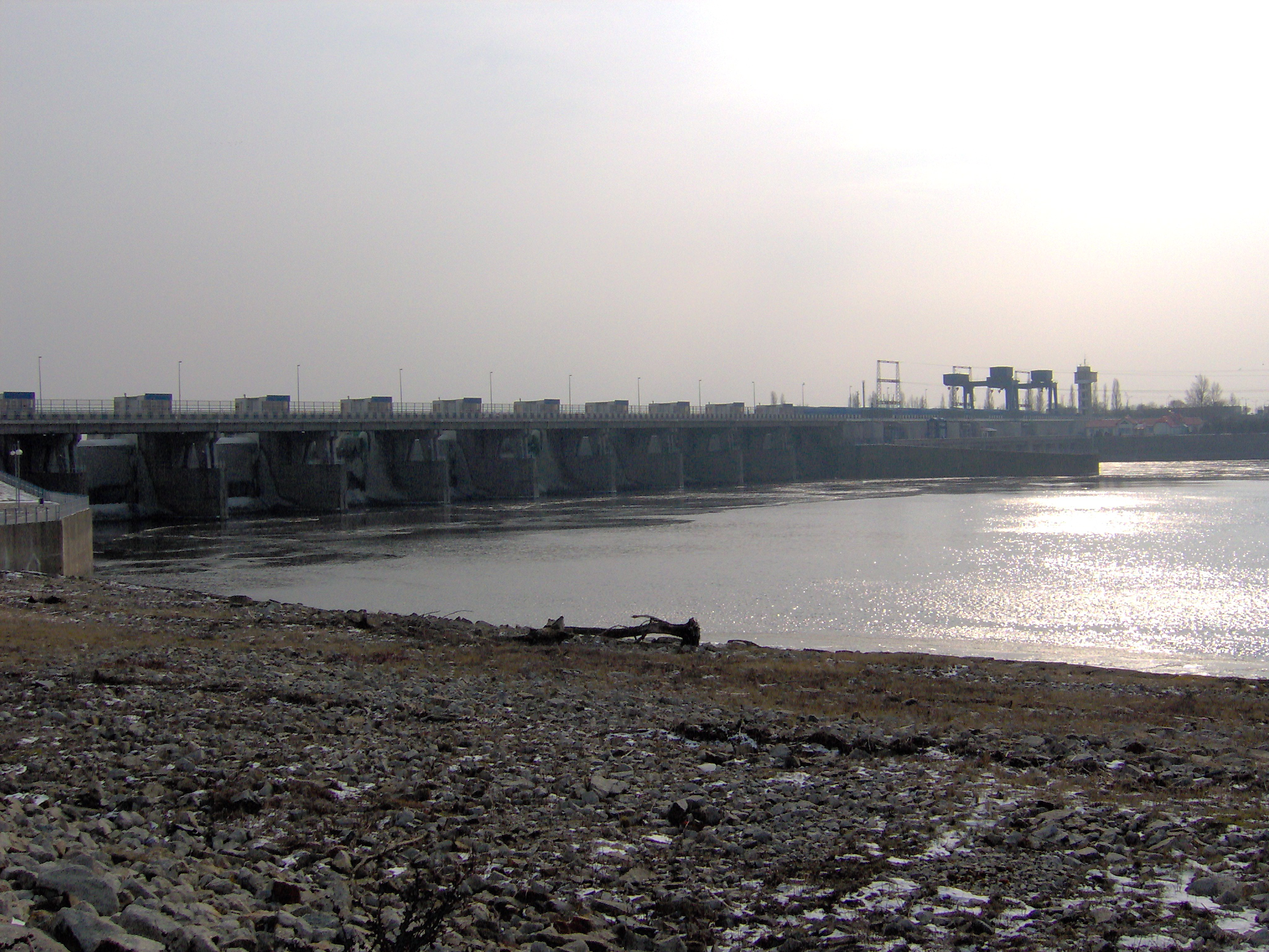 Zapora wodna na Wiśle i okolice (2007 r.)